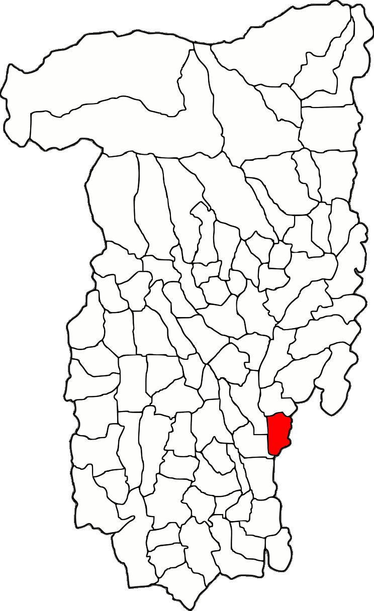 Lage der Gemeinde Drăgoești im Kreis Vâlcea (RO).